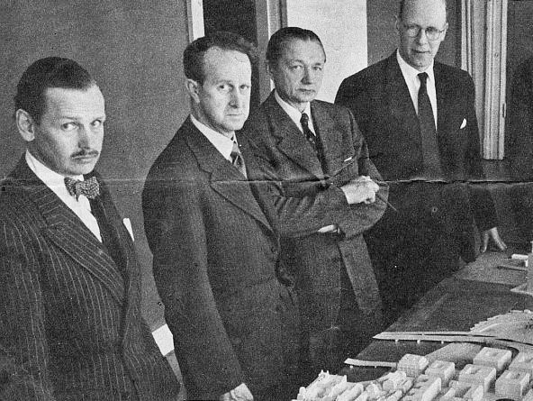 Kring gipsmodellen av det planerade framtids-Stockholm är de sju samlade som håller i trådarna till det stora omdaningsbygget. Från vänster: Chefen för stadsbyggnadskontoret, arkitekt Göran Sidenbladh, norrmalmsregleringens chef, ingenjör Åke Hedtjärn, förste ingenjören Carl-Henrik af Klercker på stadsbyggnadskontorets trafikbyrå, utredningschefen A. Nordberg, förste arkitekten Torsten West